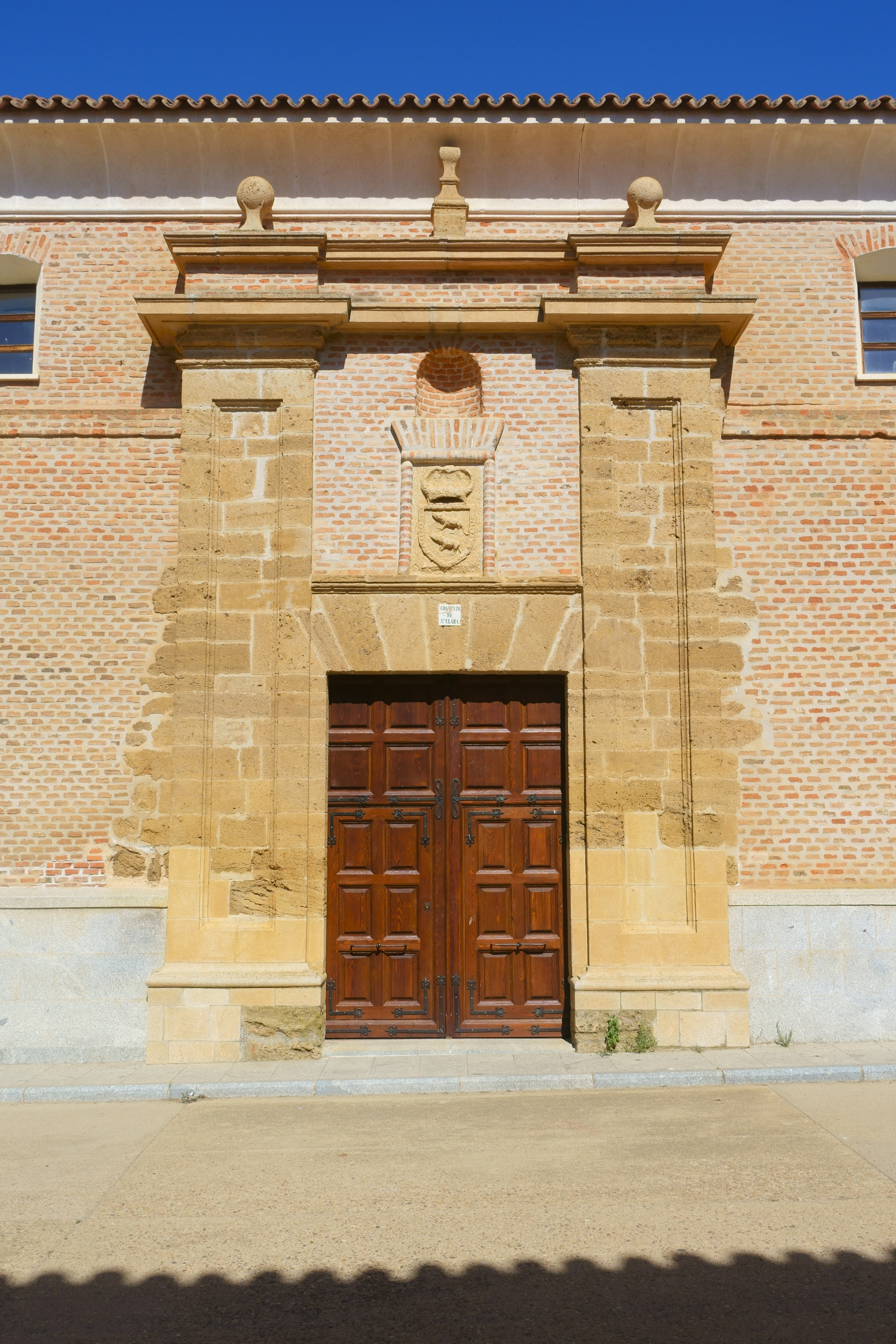 Convento de la Asunción, en Villalobos (Zamora, España).